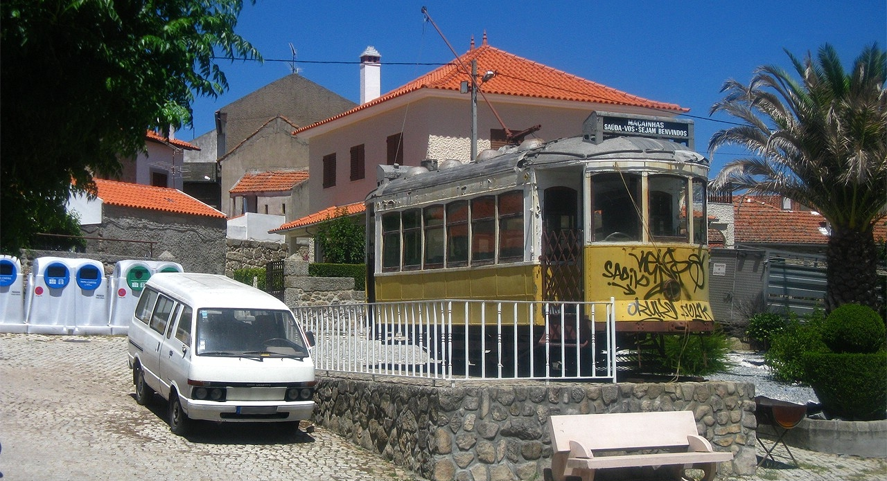 Reza a história que este eléctrico foi oferecido a Maçainhas pelo então presidente da Carris que era natural da freguesia, em 1992.